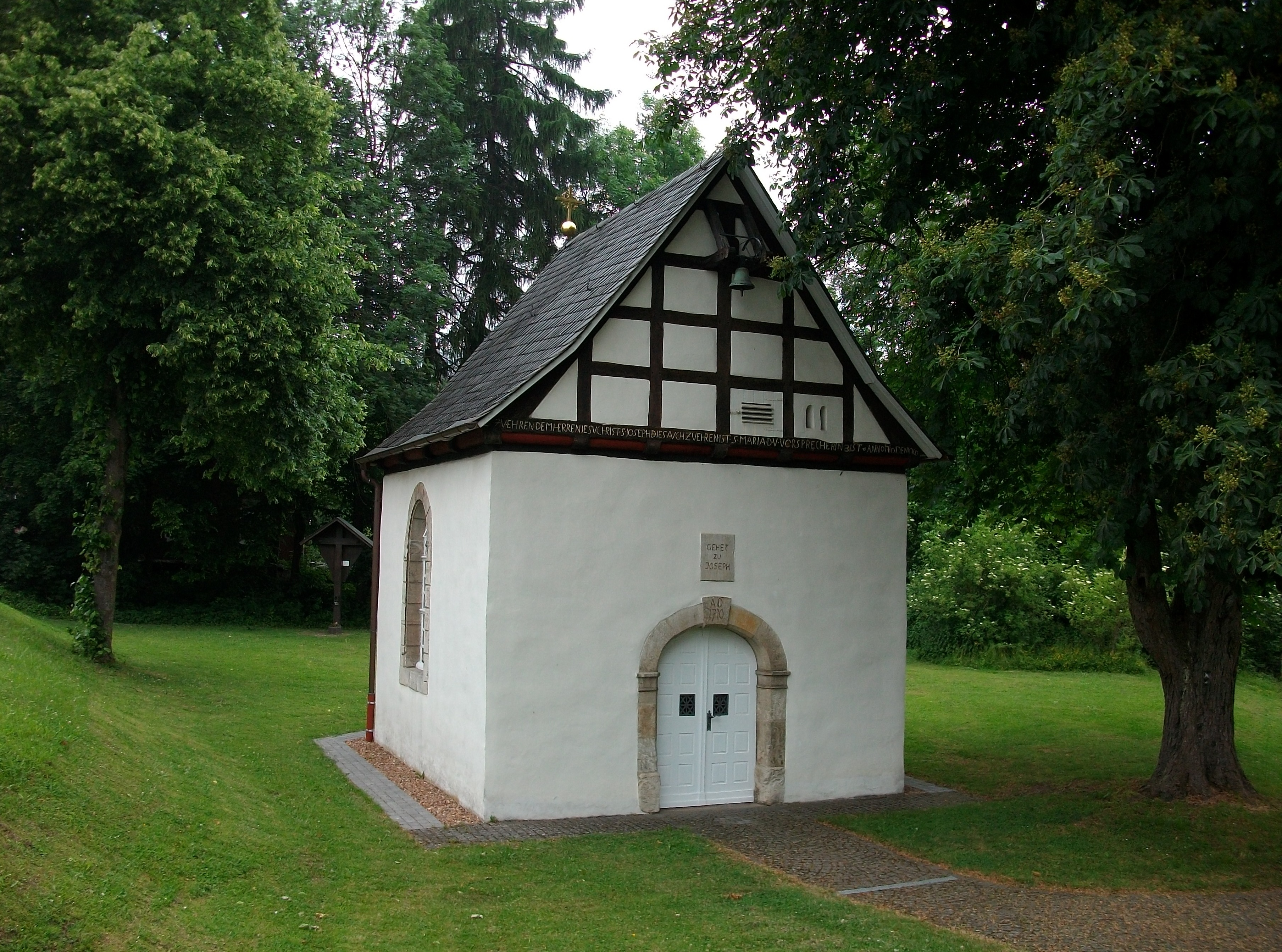 Denkmalgeschützte Josefskapelle (Anno 1710) in Marsberg (Germany)